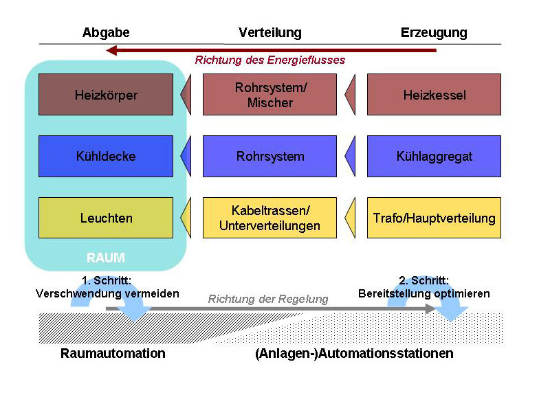 Regelschema einer energieeffizienten Raumautomation